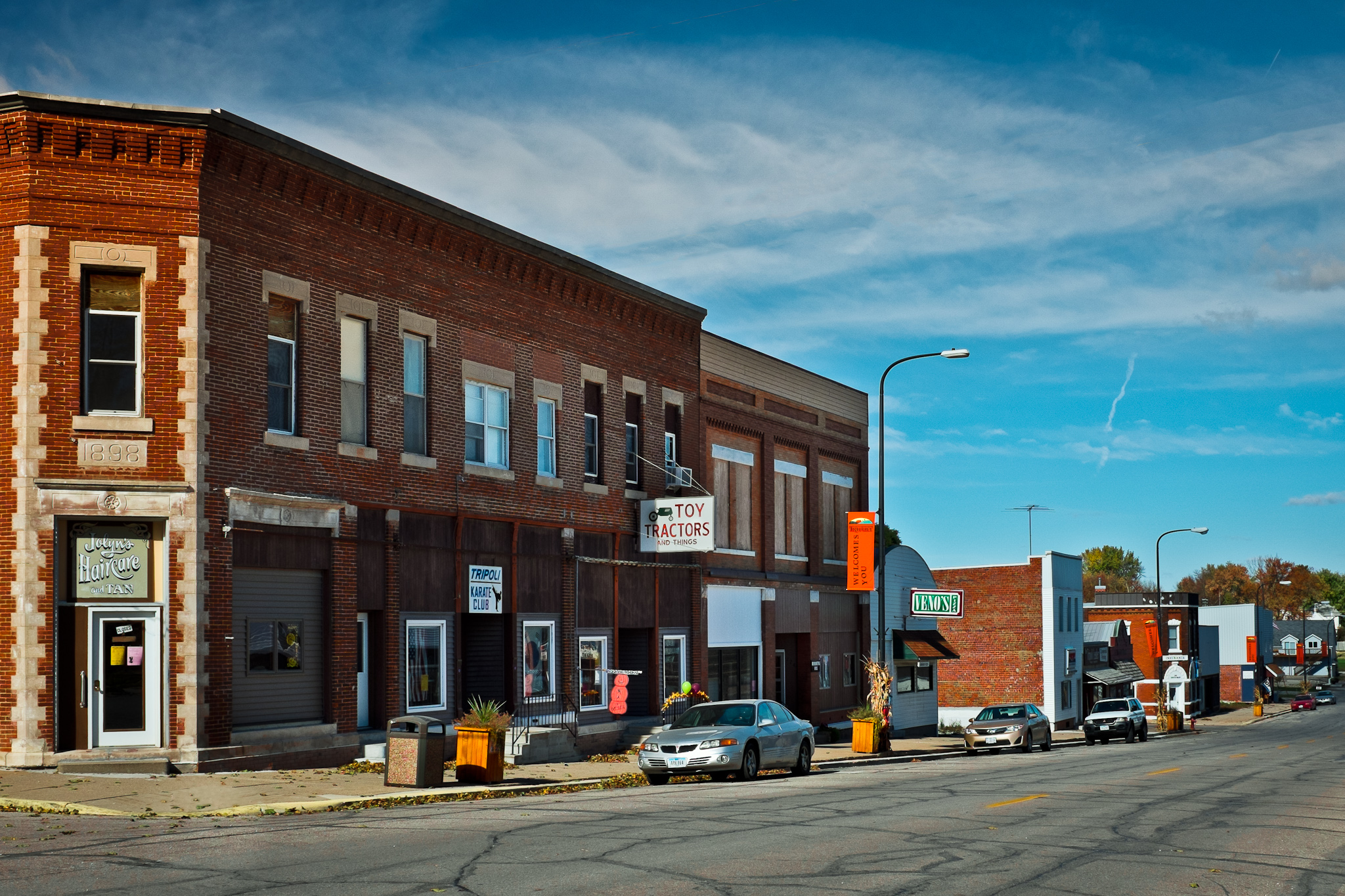 Downtown Tripoli, Iowa